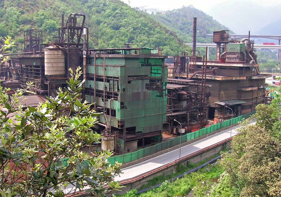 L'industria chimica Luigi Stoppani SpA a Cogoleto (GE) nel 2007, in stato di abbandono